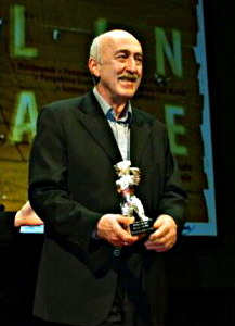 ოთარ იოსელიანი